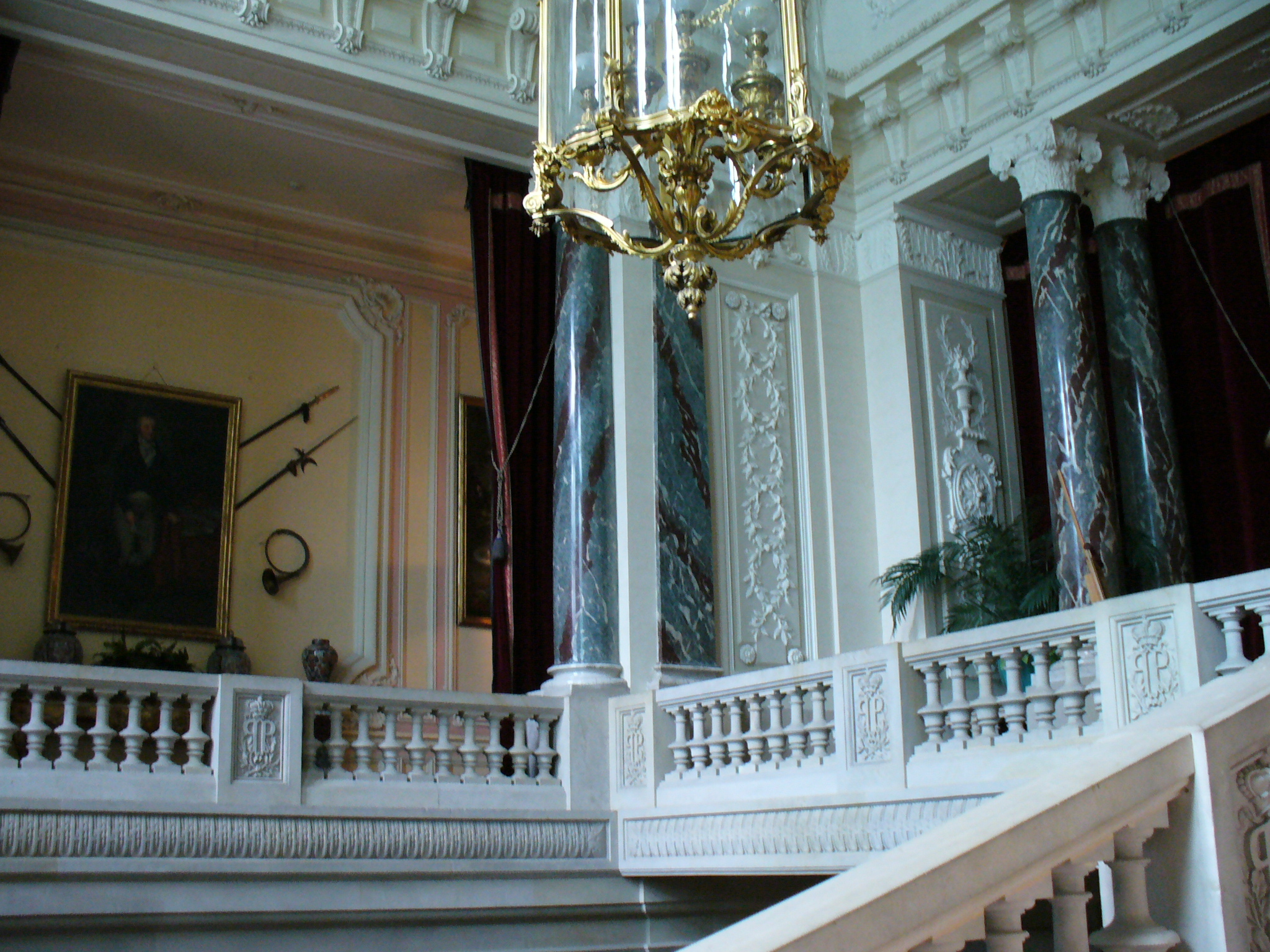 Pałac w Pszczynie - klatka schodowa